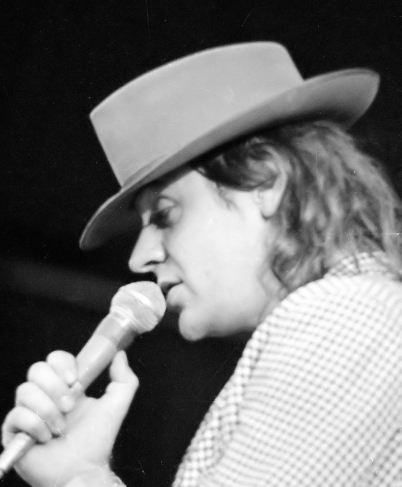 Der Musiker Udo Lindenberg (1987) - Titel des Werks: "Udo Lindenberg (1987)".